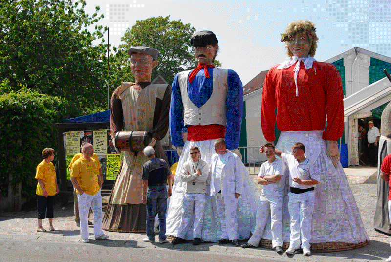 ducasse de ligne 2007, de gauche à droite: le Brasseur, géant de Ligne, Zante et Rinette, géants de Maffle